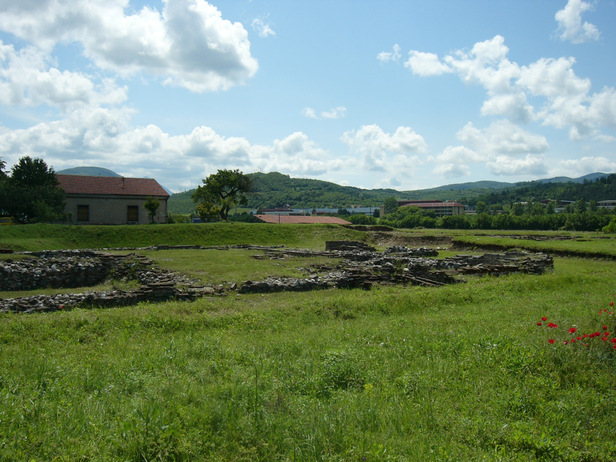 Medijana, archeological site near Niš